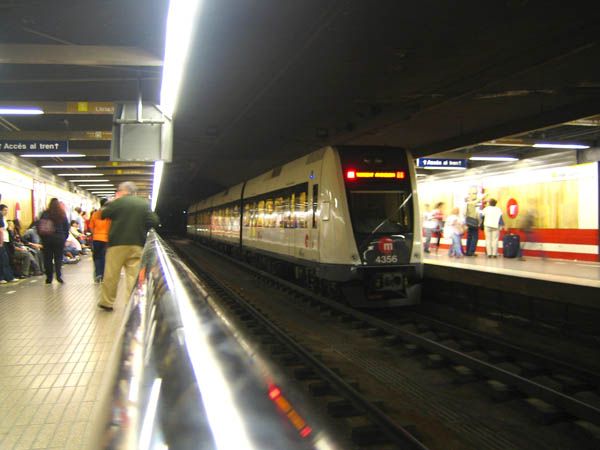 Estació de MetroValencia Àngel Guimerà.